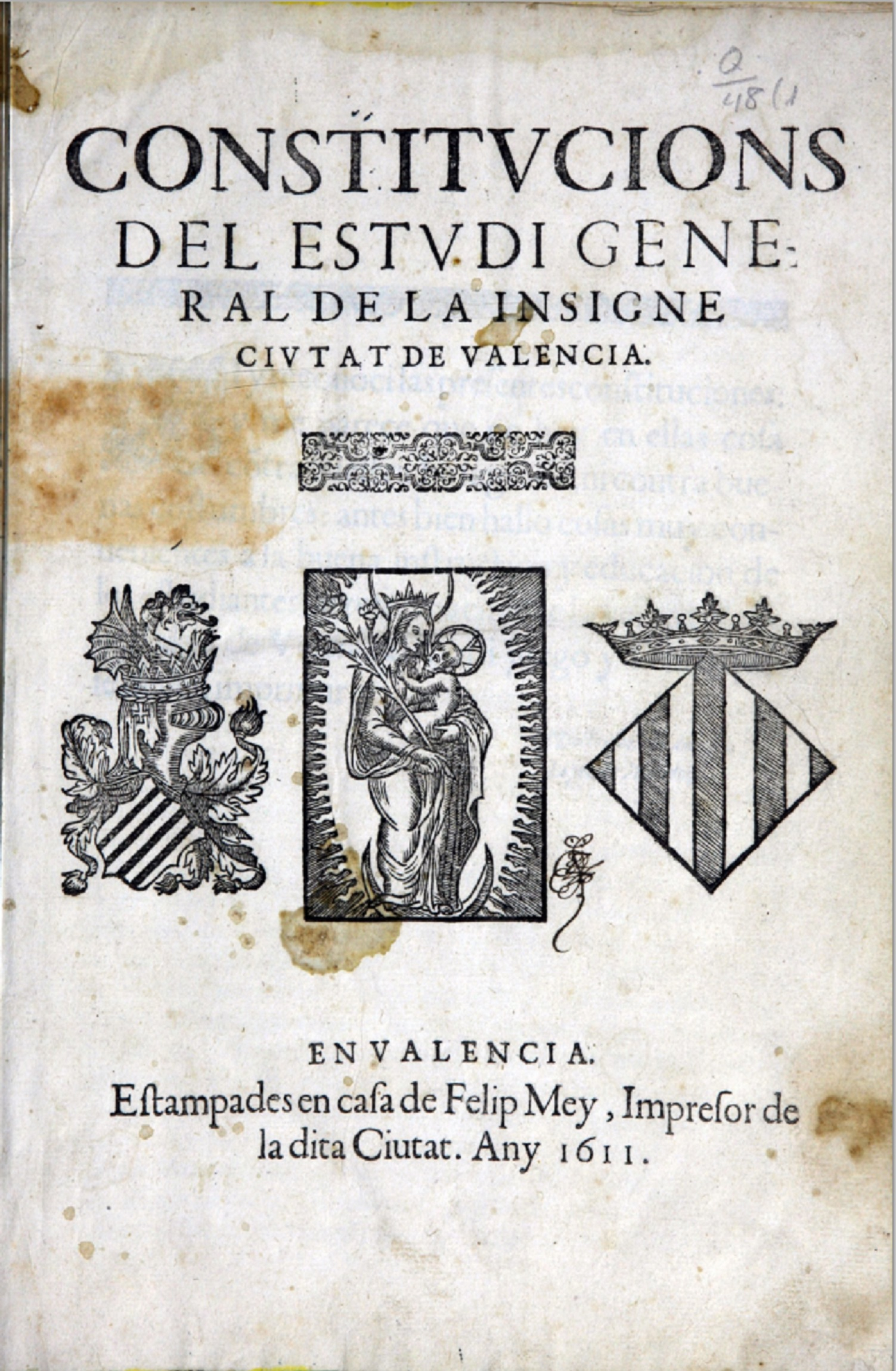 Portada de l'obra "Constitucions del Estudi General de la insigne ciutat de Valencia" (1611).